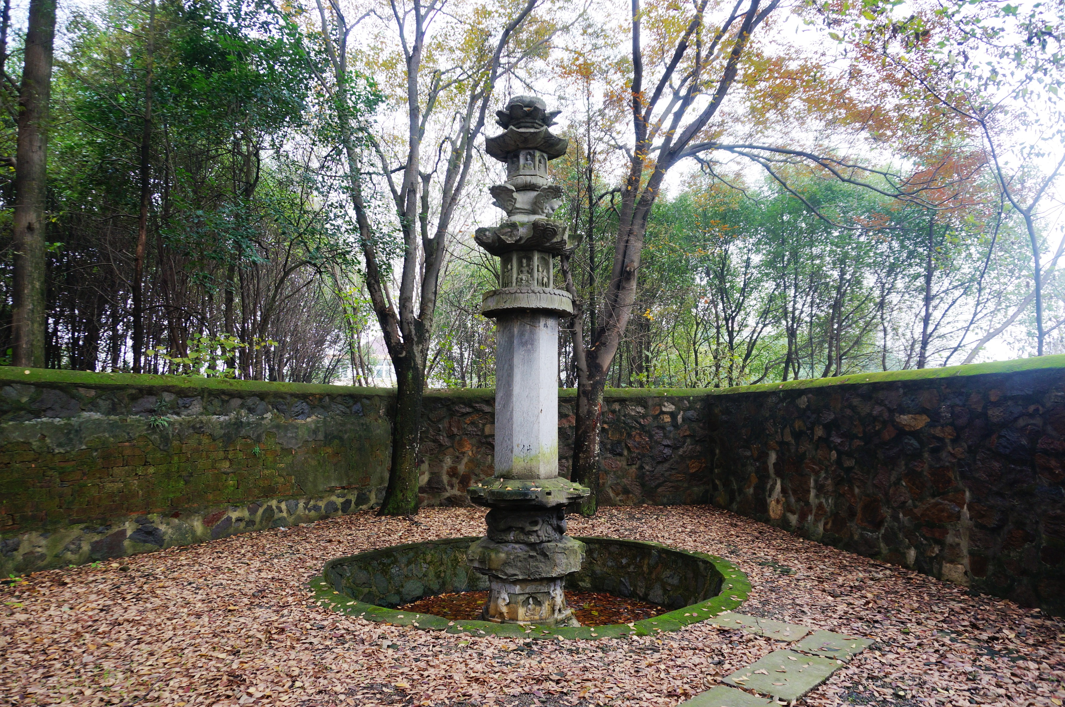 安国寺经幢，会昌二年（842）经幢东侧。